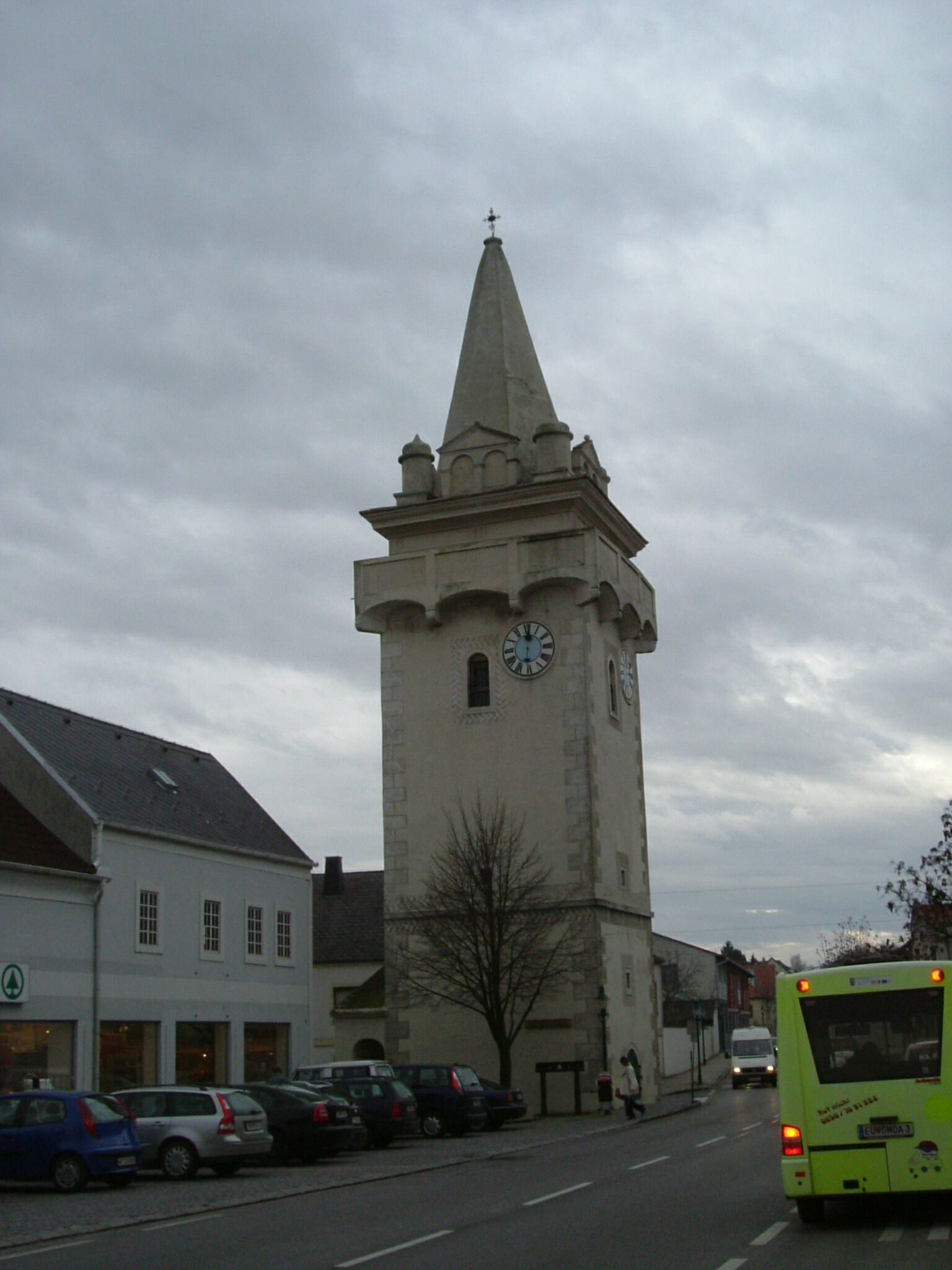 Breitenbrunn, Austria - Burgenland Turkish tower